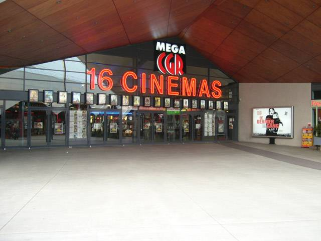 Le cinéma CGR de Torcy à Bay 1